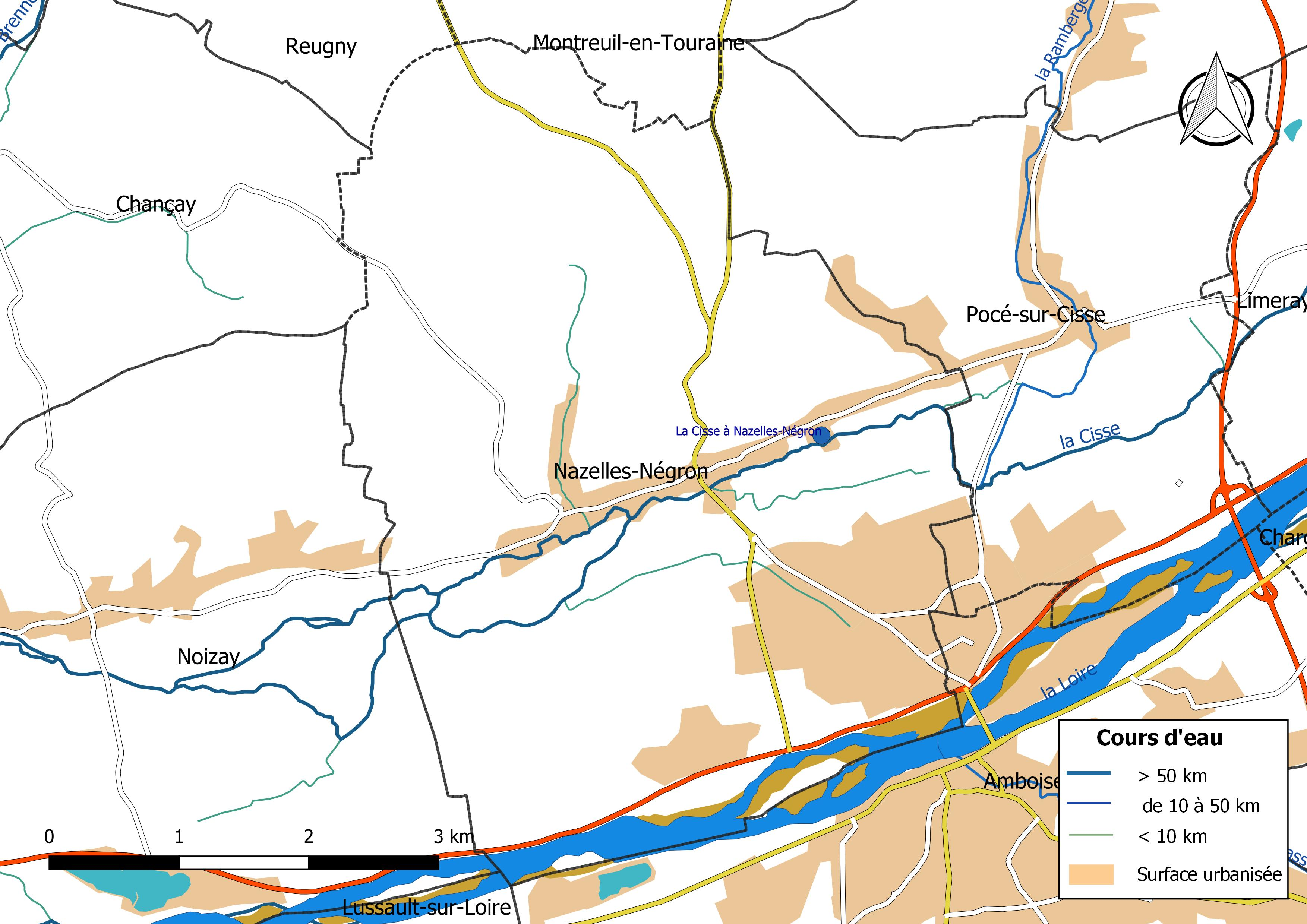 Carte du réseau hydrographique de la commune de Nazelles-Négron (France).